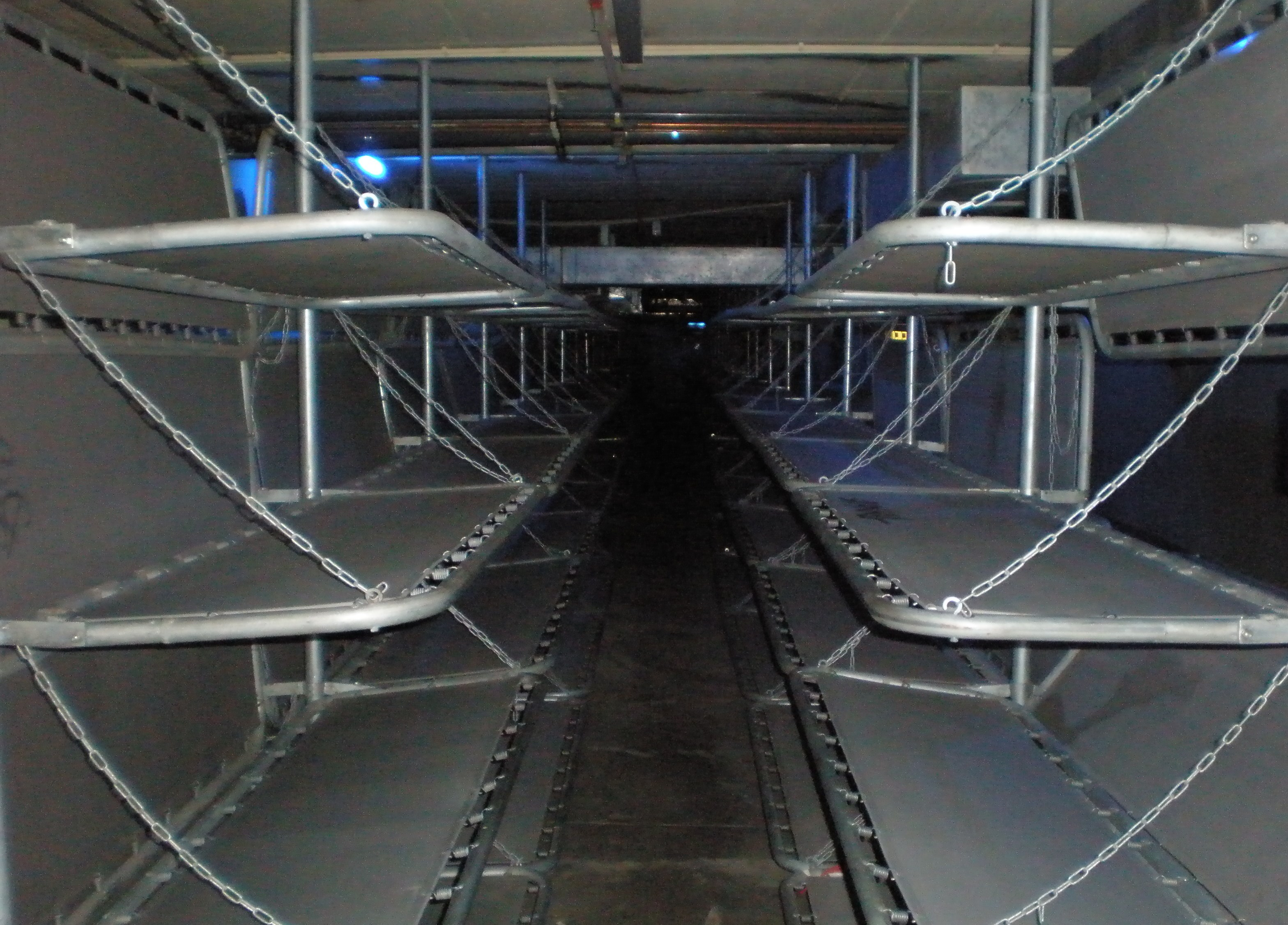 Die Mehrzweckanlage Kudamm-Karree in einer Tiefgarage in Berlin, errichtet 1973 bis 1974 als Schutzraum für 3.592 Personen.